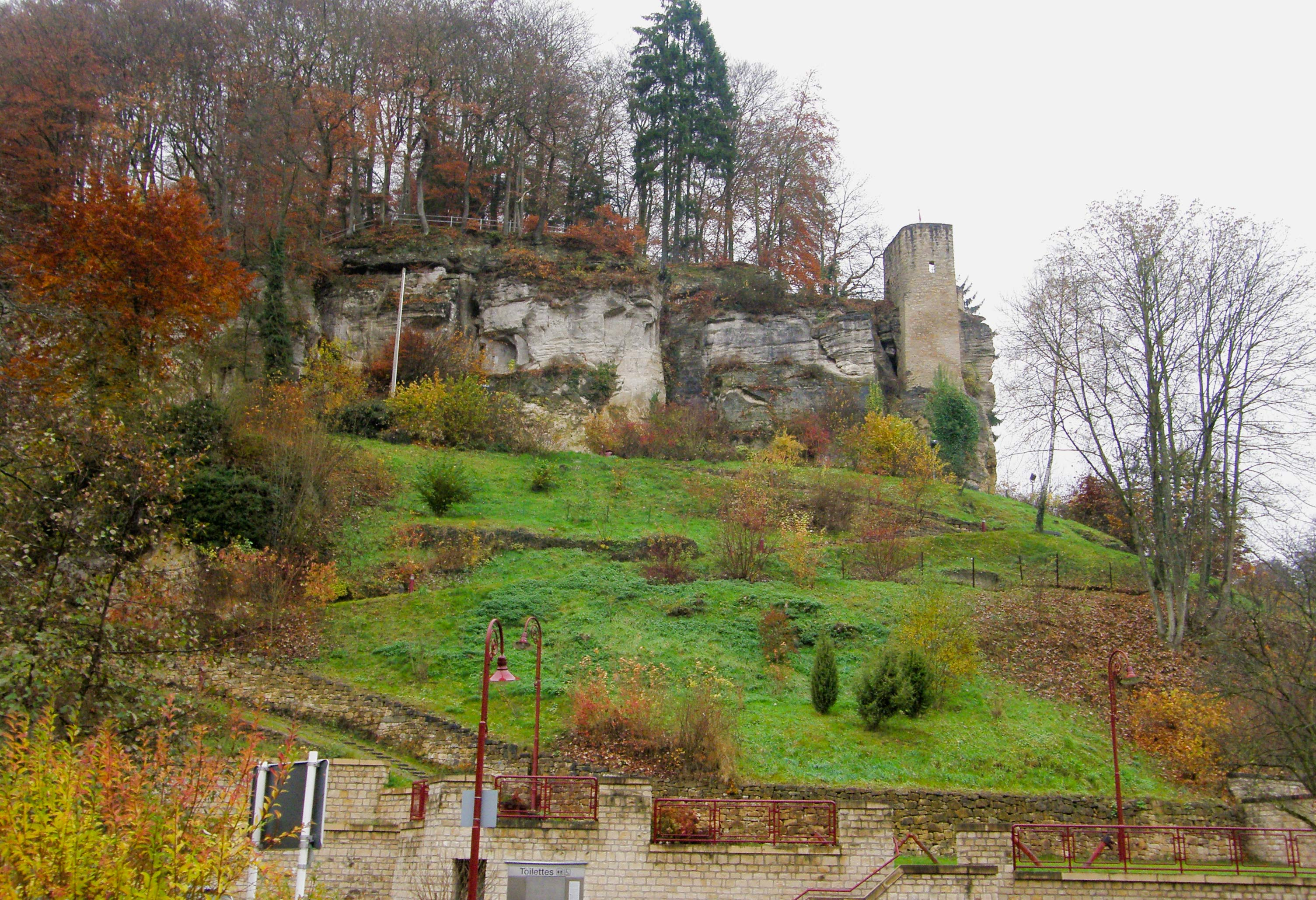 De Fielser Verluerekascht vun der Iernz aus gesinn.